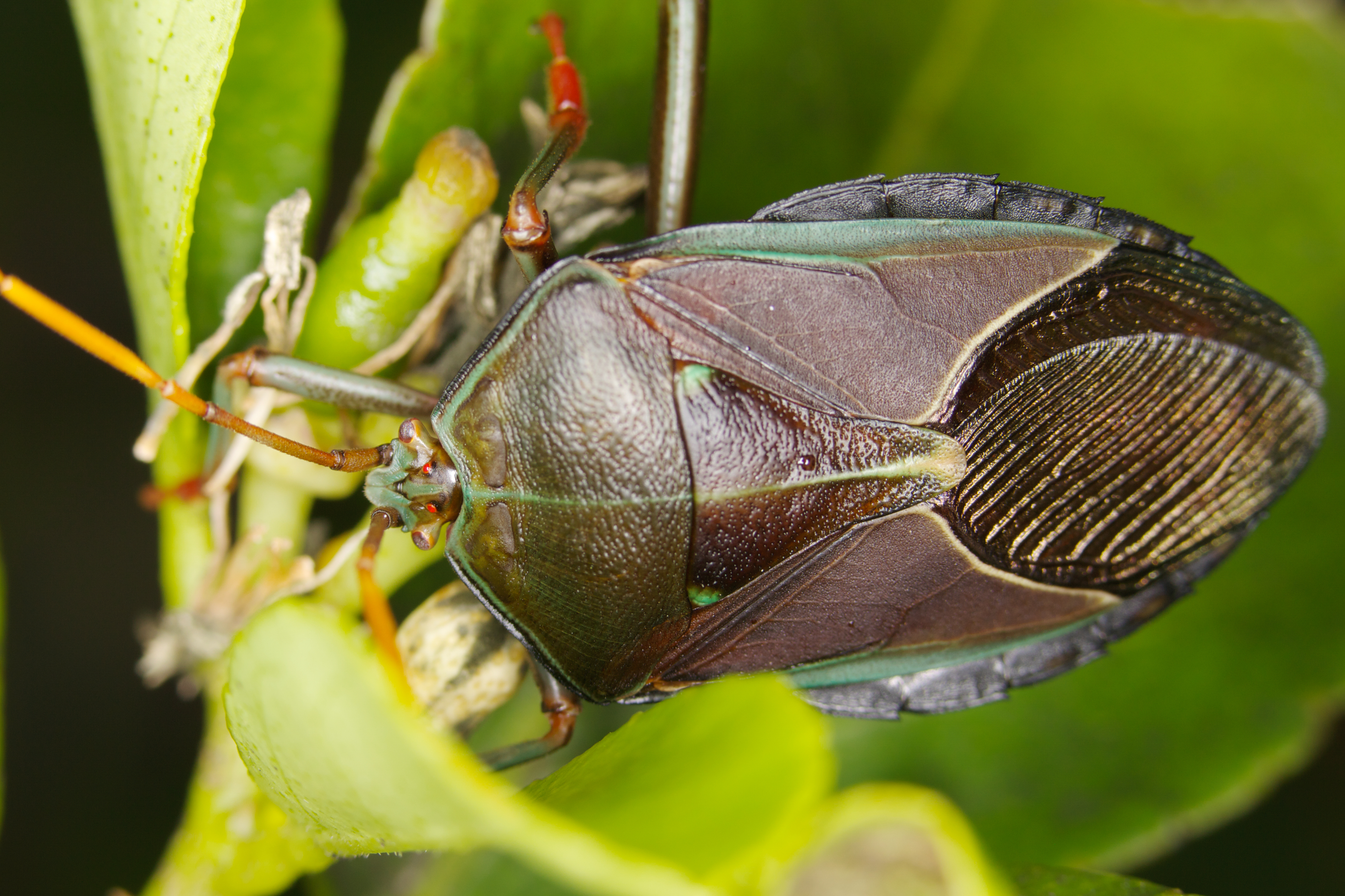 Bronze orange bug